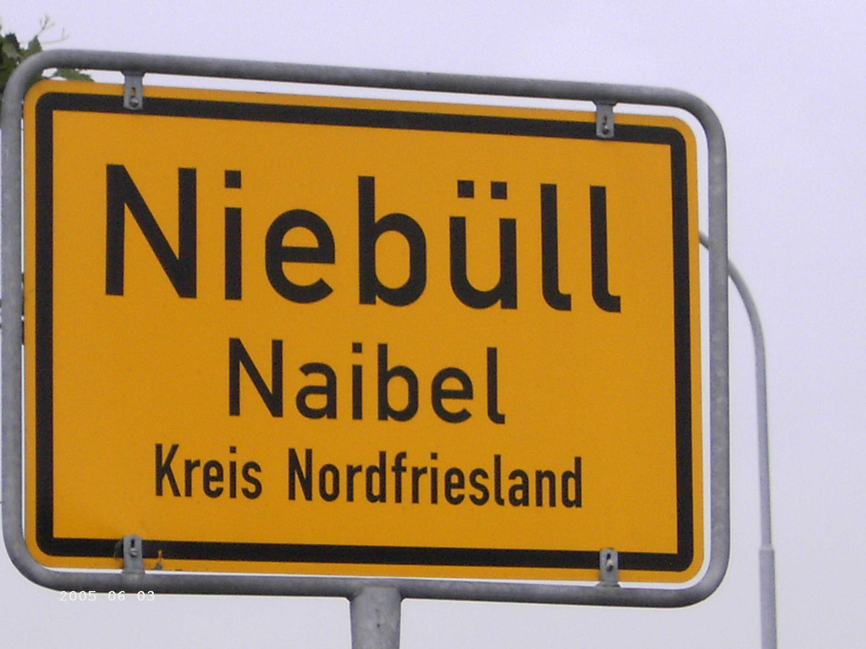 Description in de wikipedia Beschreibung: Ortsschild Niebüll, zweisprachig Fotograf: Timt, photo selbst gemacht, 03. June 2005 Lizenz: GFDL